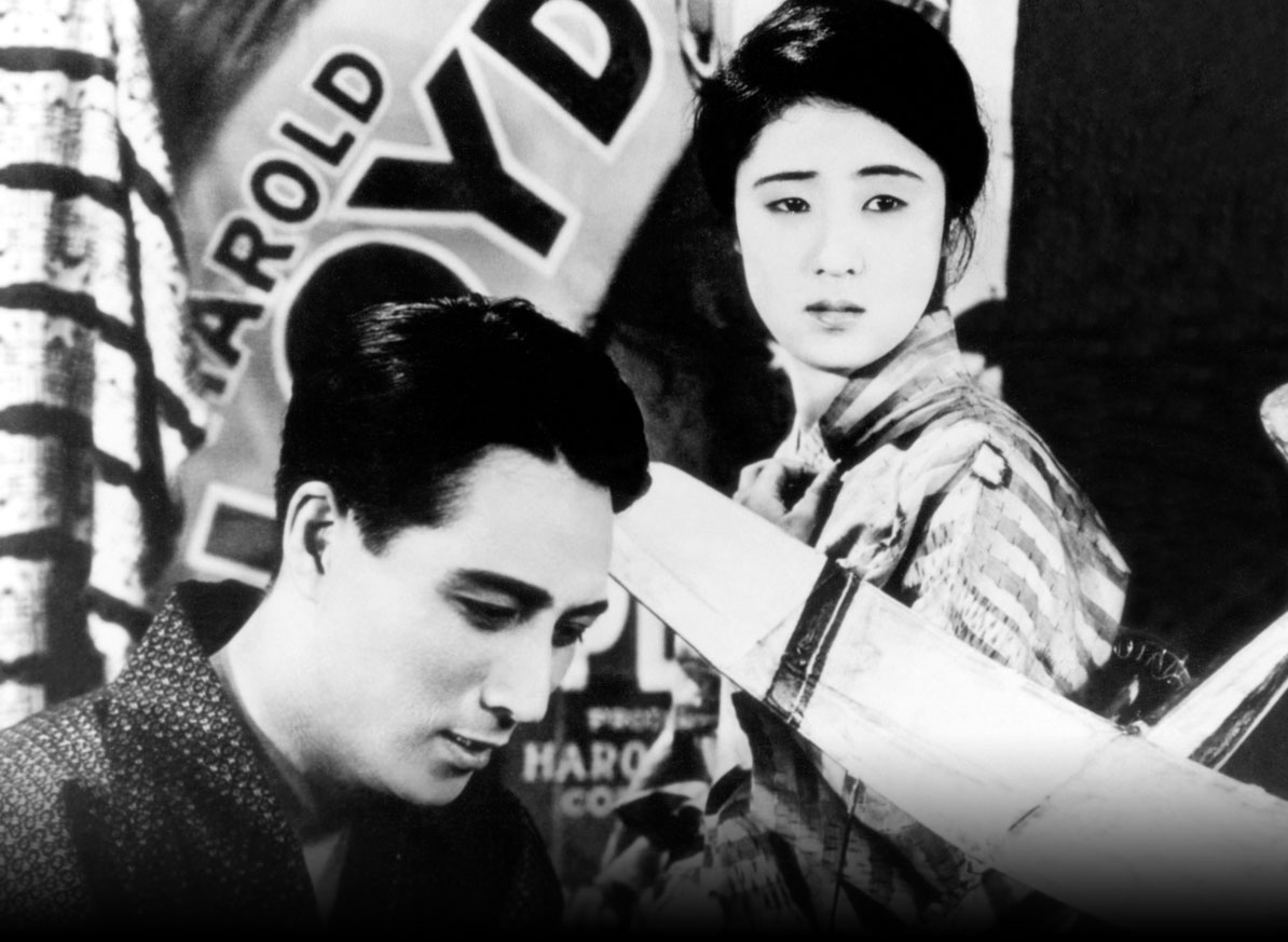 Minoru Takada and Kinuyo Tanaka in Daigaku wa deta keredo (1929) directed by Yasujirō Ozu